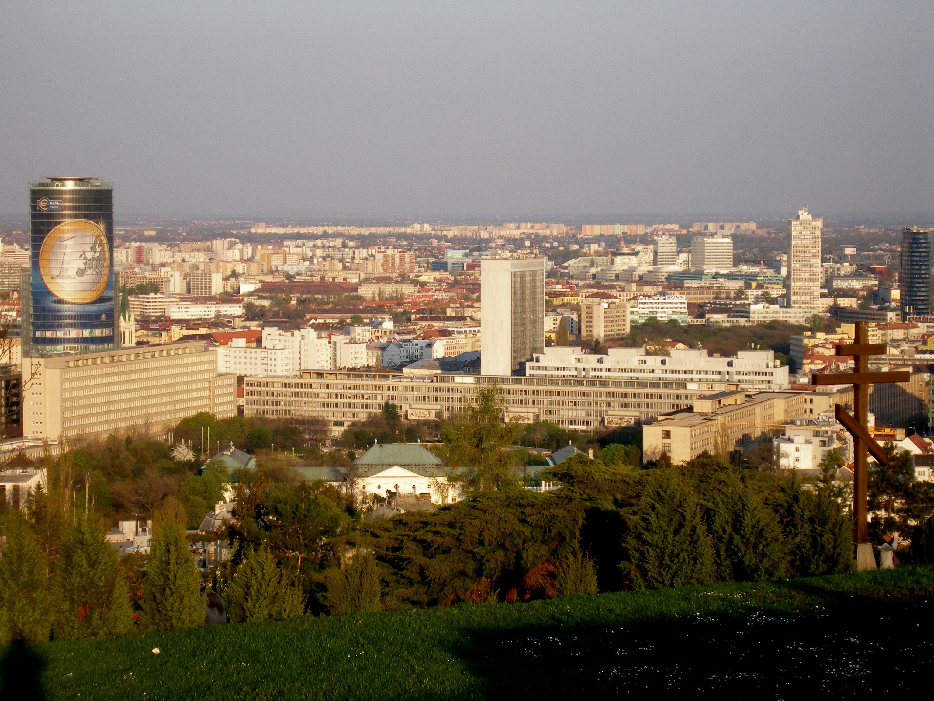 Slavín - Pamätník s cintorínom sovietskych vojakov z Druhej svetovej vojny, ktorí padli pri oslobodzovaní Bratislavy a okolia na jar 1945. Dostavaný bol v roku 1960. Pohľad na časť hlavného mesta Slovenskej republiky Bratislavy.